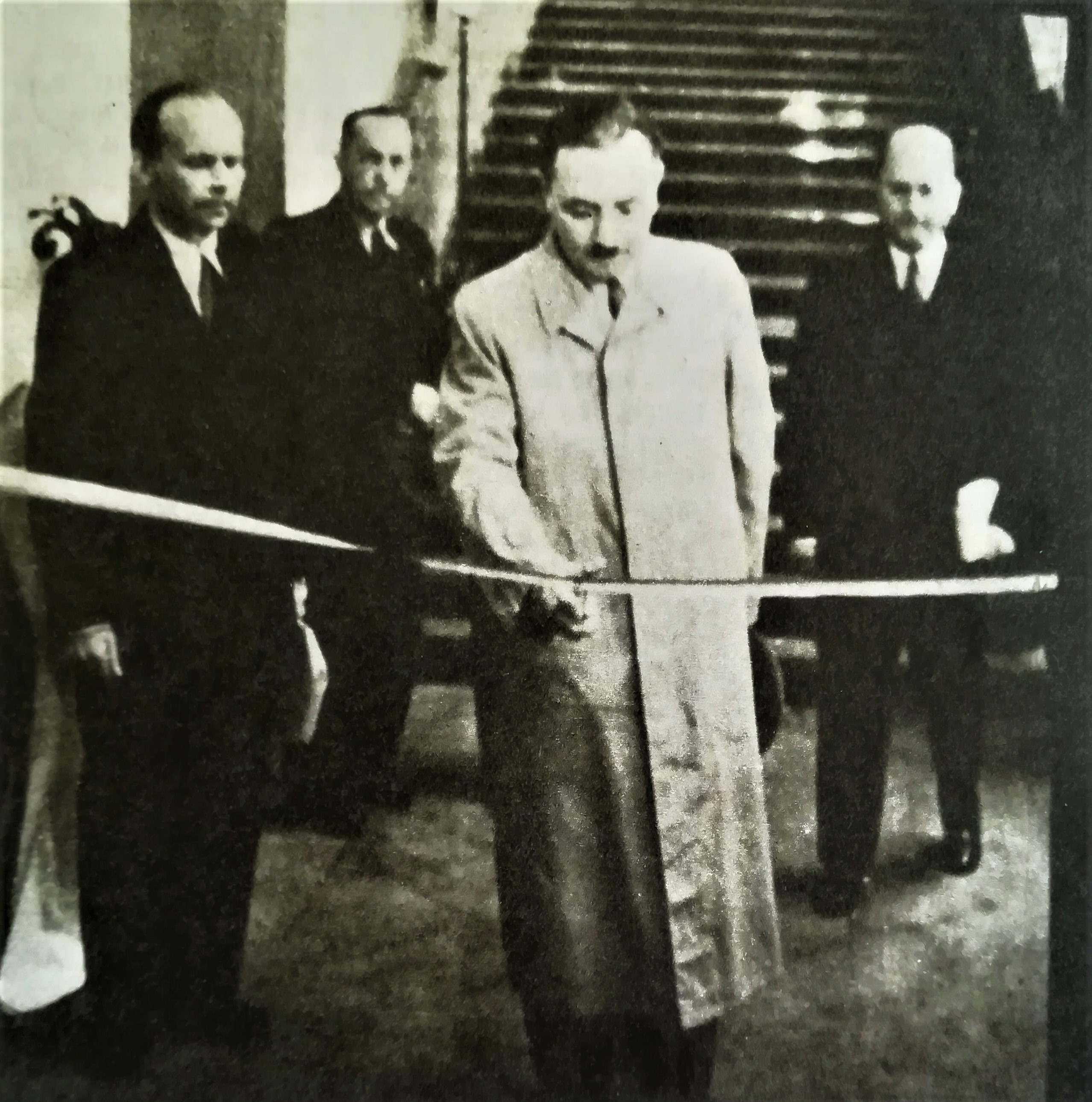 Bolesław Bierut otwiera wystawę "Warszawa oskarża" w 1945 r.